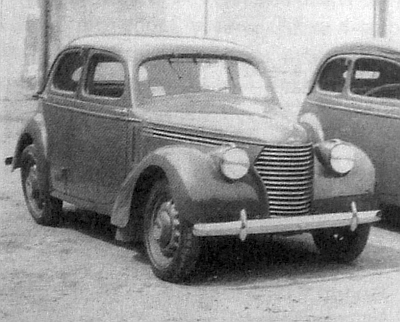 Škoda Popular 1101 s karosérií tudor.